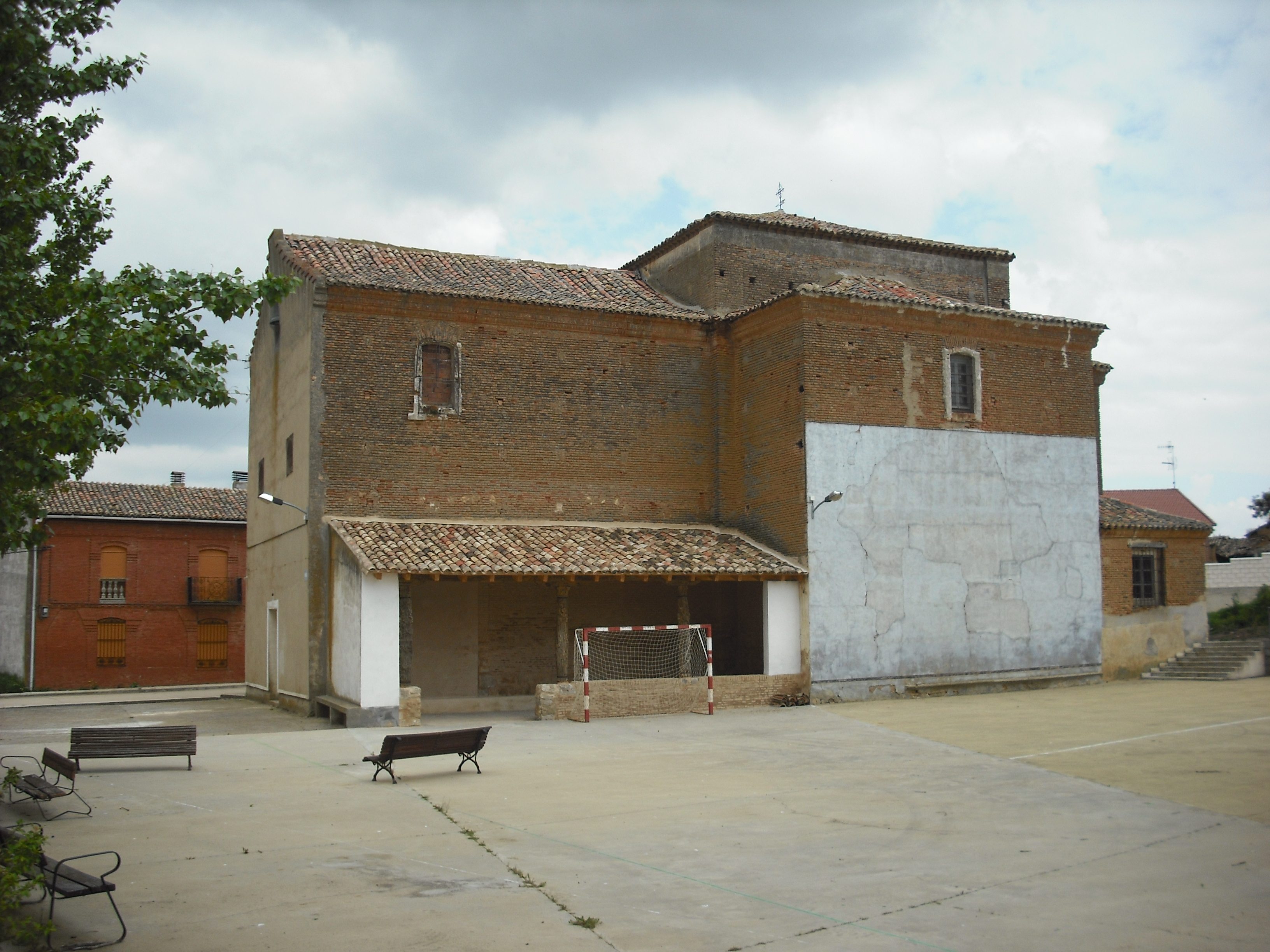 Iglesia del Salvador de Fontihoyuelo (Valladolid, Castilla y León).